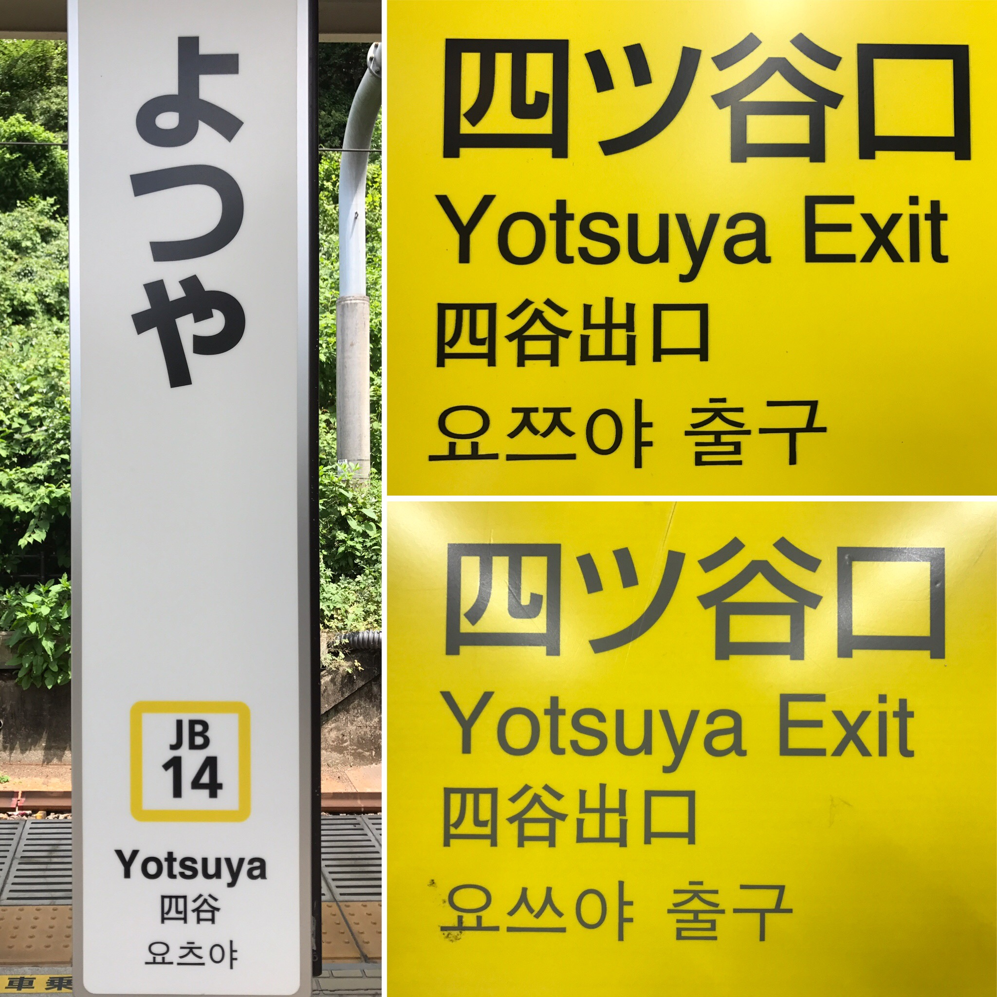 JR四ツ谷駅で見られる「よつや」のハングル表記各種の合成写真。2017年6月11〜12日撮影。